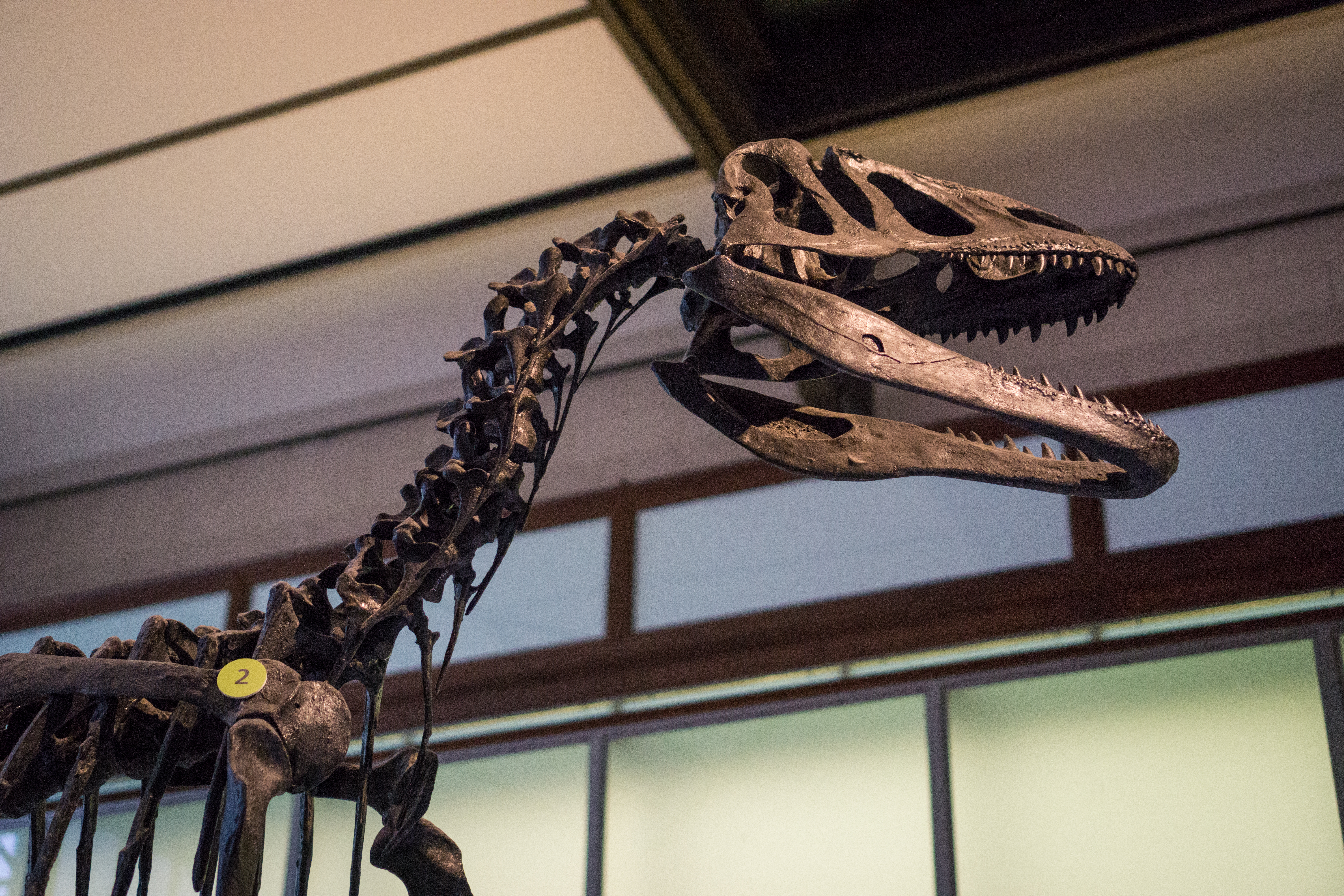 Dinosaure du Muséum des sciences naturelles de Belgique This photo of movable heritage has been taken in the Brussels Capital Region